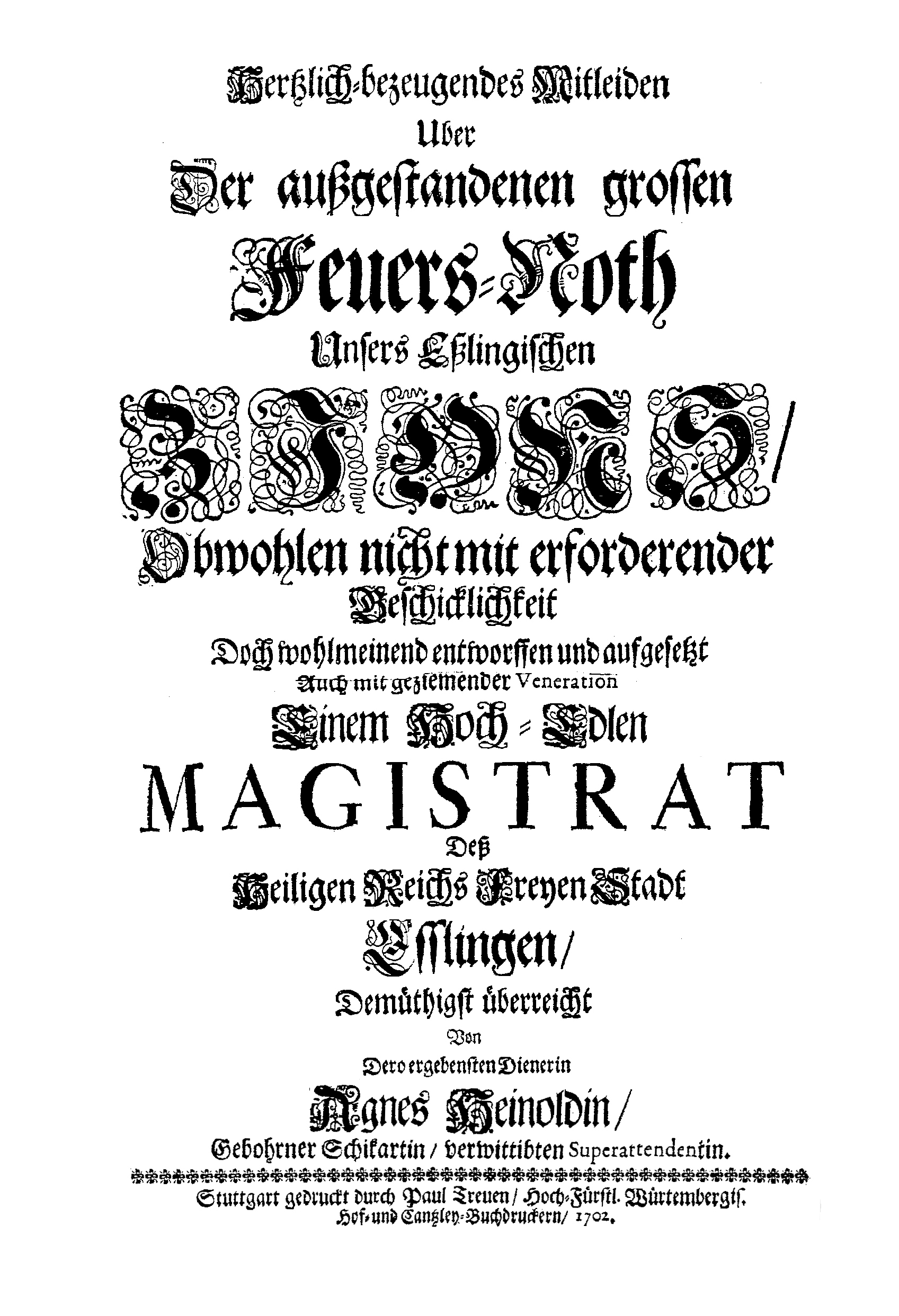 Schriift anlässlich des Stadtbrandes in Esslingen 1702 (Titelseite)